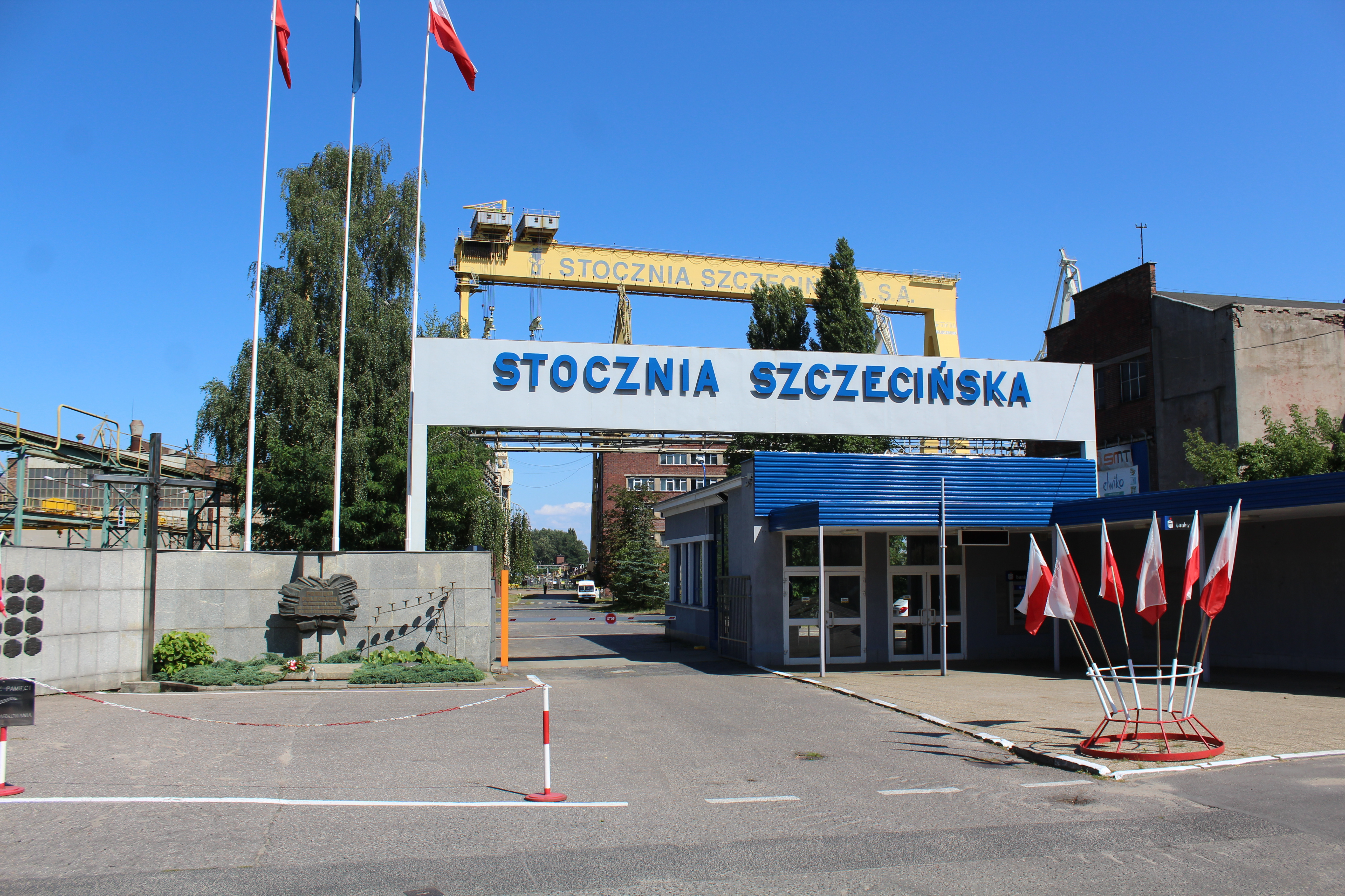 Brama dawnej Stoczni Szczecińskiej, 2017